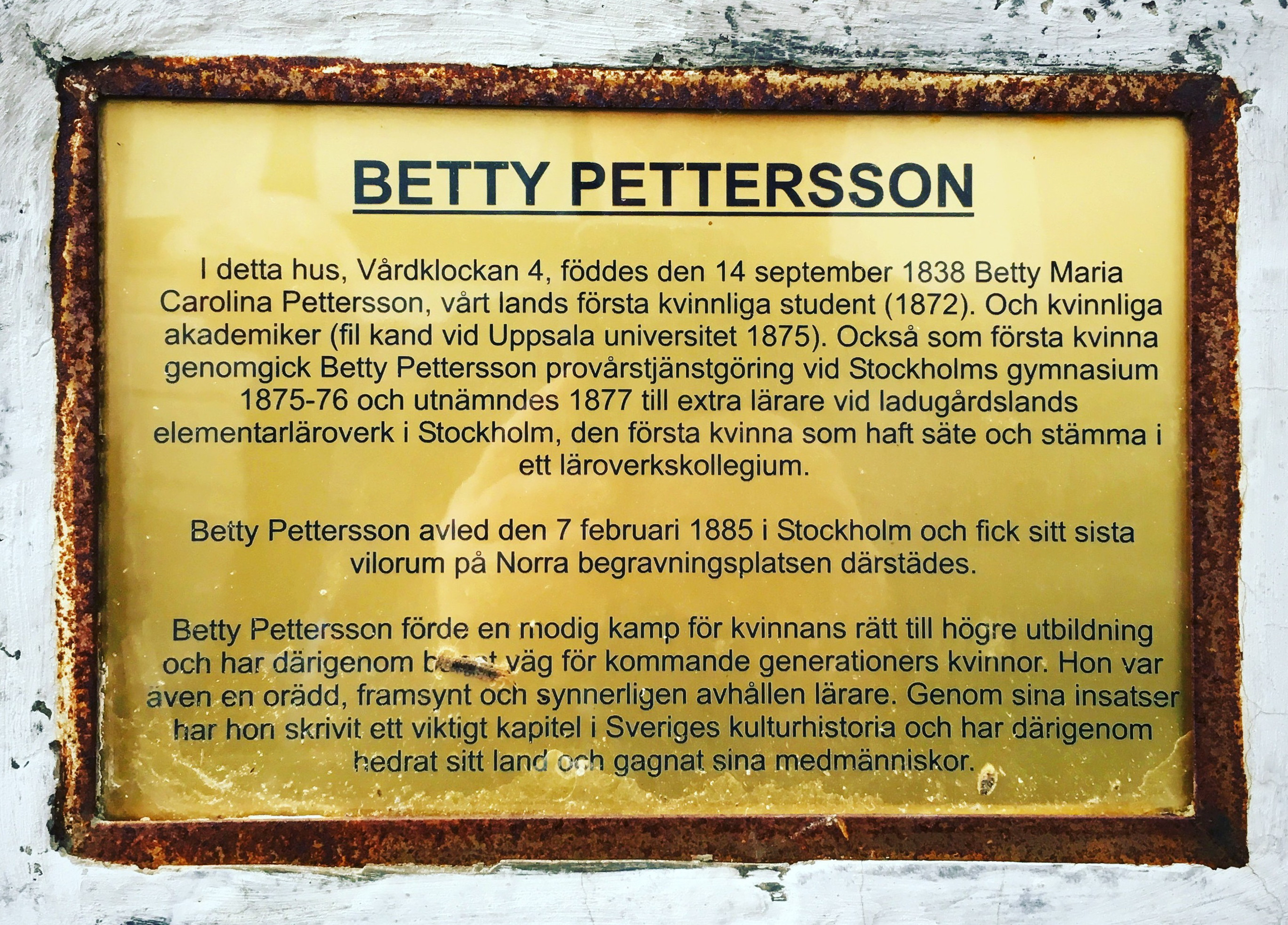 Skylt på fasaden till Betty Pettersson hus i Visby